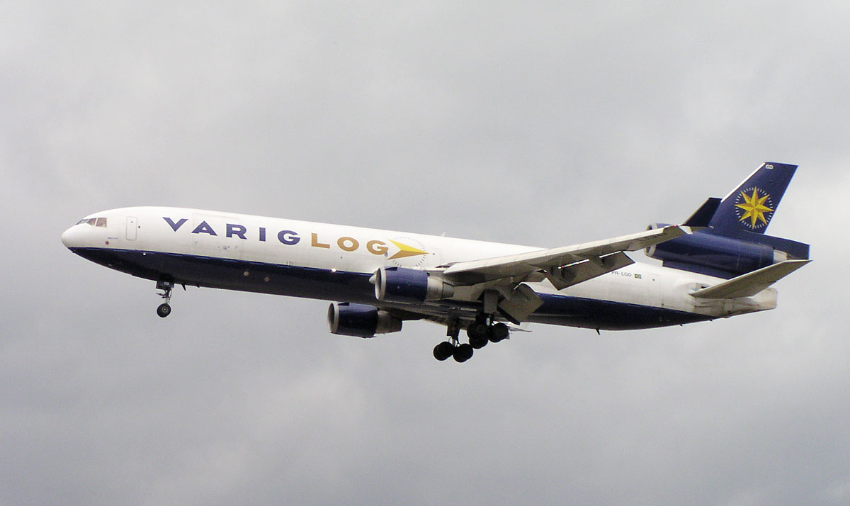 Varig Log McDonnell Douglas MD-11F (PR-LGD) in Frankfurt (EDDF)